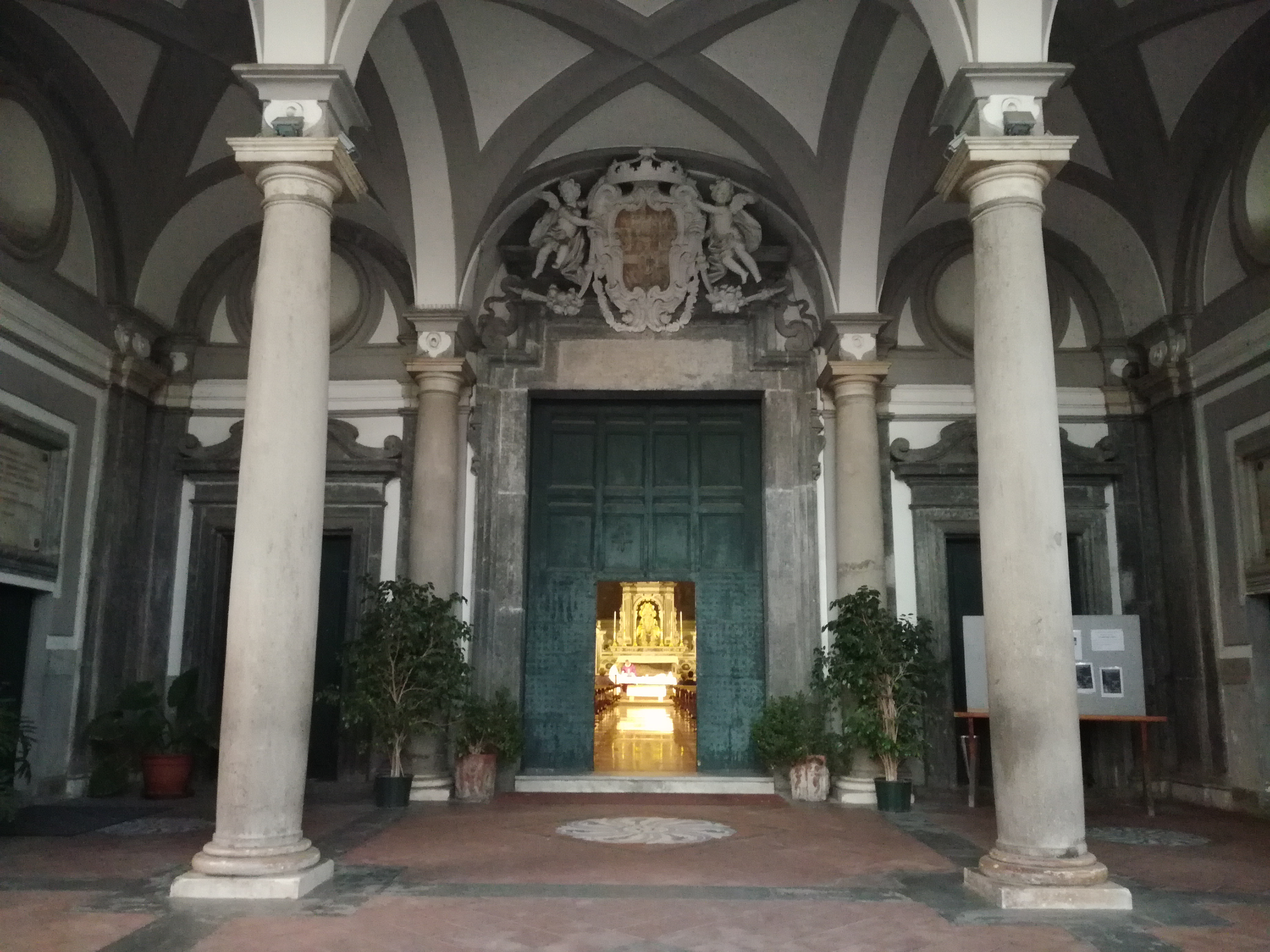 Vestibolo Angeli alle Croci